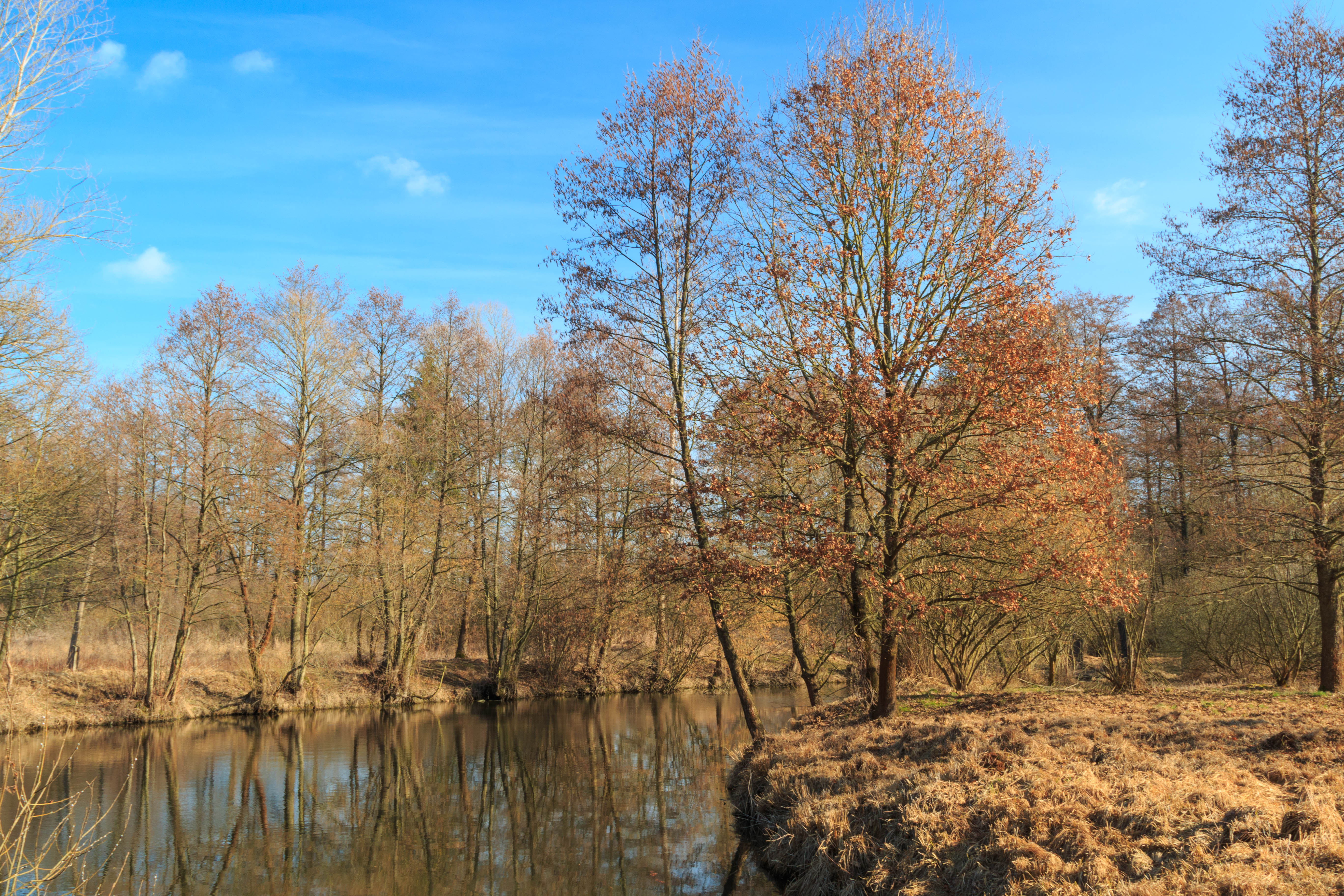 PP Vodní tůň Project: Chráněná území.